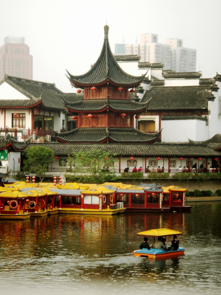 南京夫子庙魁光阁，又名奎星阁、文星阁。